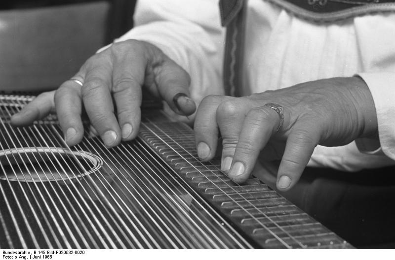 Zitherspieler Alfons Schmidseder in der Landesvertretung Bayern Bonn